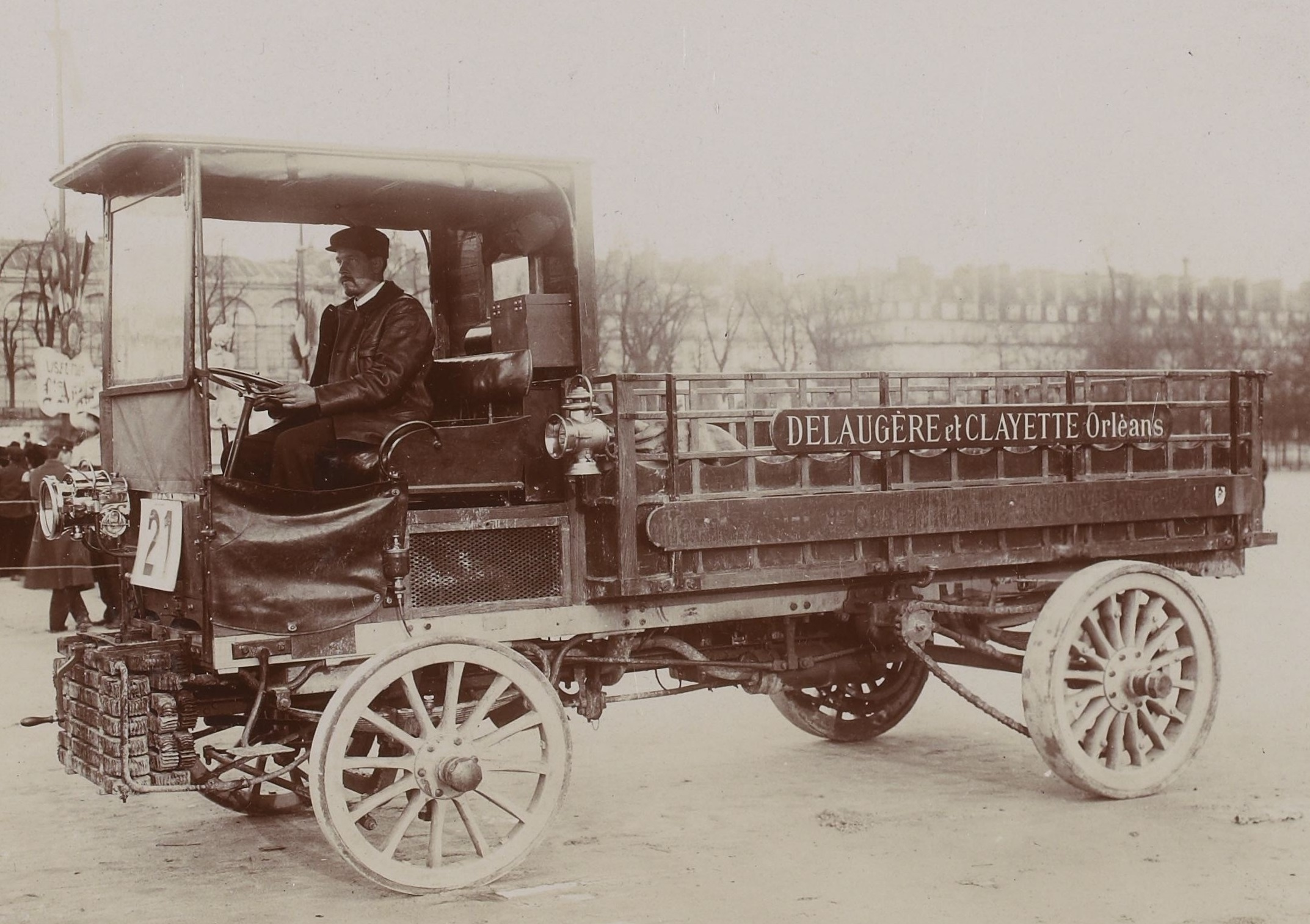 [Collection Jules Beau. Photographie sportive] : T. 33. AnnÃ©es 1906 et 1907 / Jules Beau : F. 8v. [Paris-Marseille-Paris. 19 novembre-5 dÃ©cembre 1906]